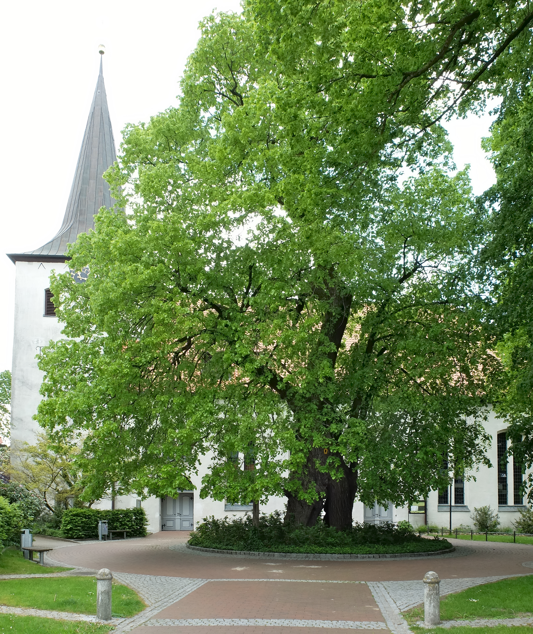 ND ROW 009 - Gerichtslinde in Scheeßel Landkreis Rotenburg (Wümme), Niedersachsen